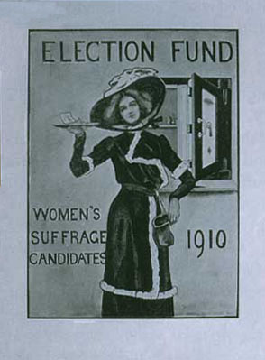 Bertha Newcombe Poster Artists' Suffrage League (1910)